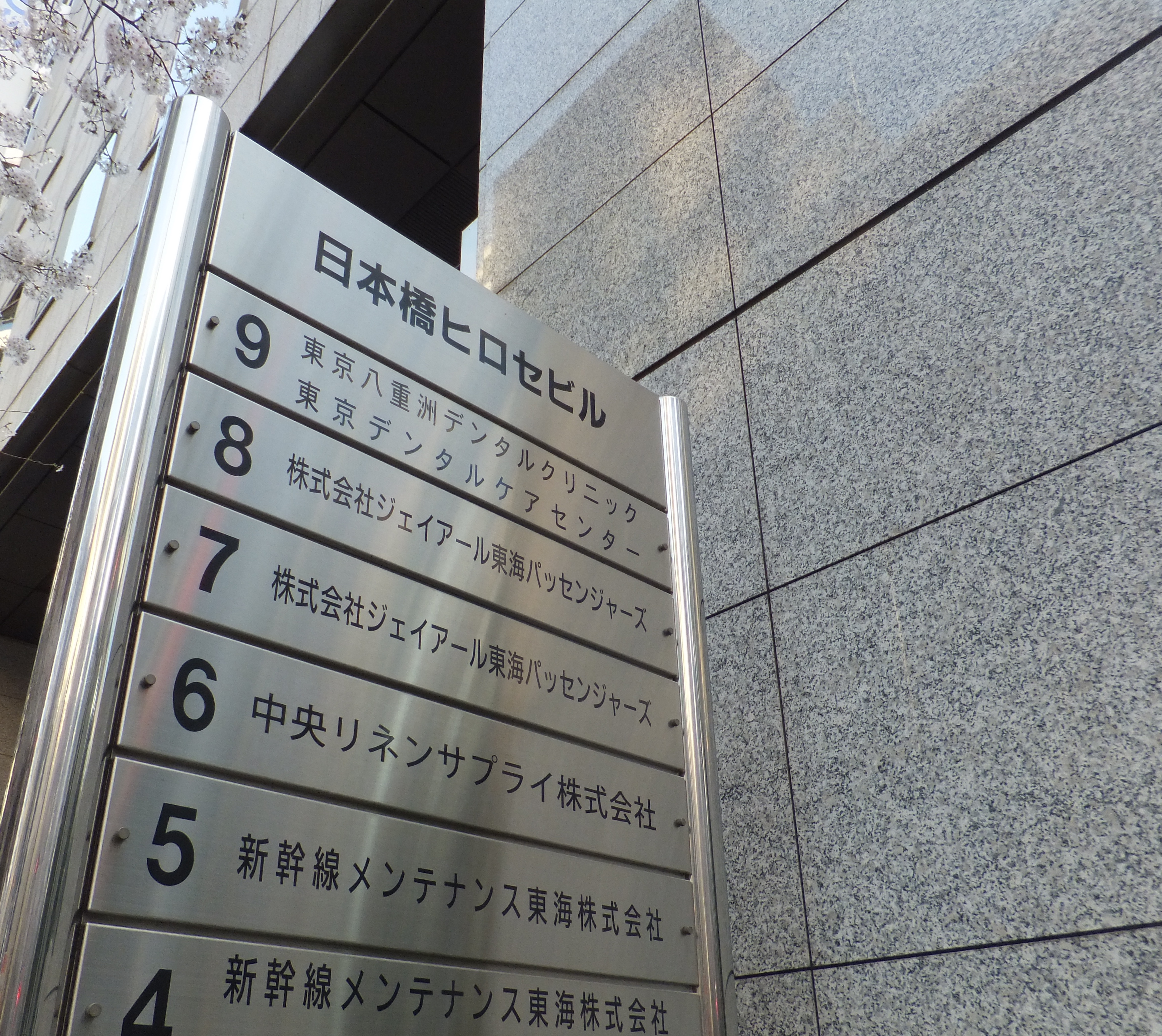 日本橋ヒロセビルの看板。